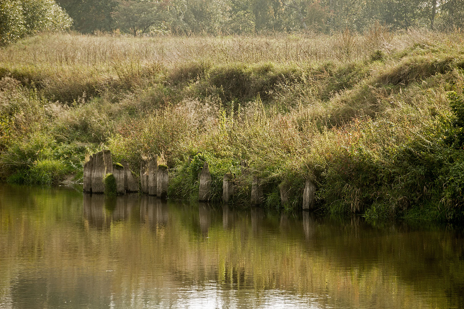 Holzpfeiler einer früheren Muldebrücke (ca. 45 m von der heutigen Brücke flussaufwärts am linken Ufer)